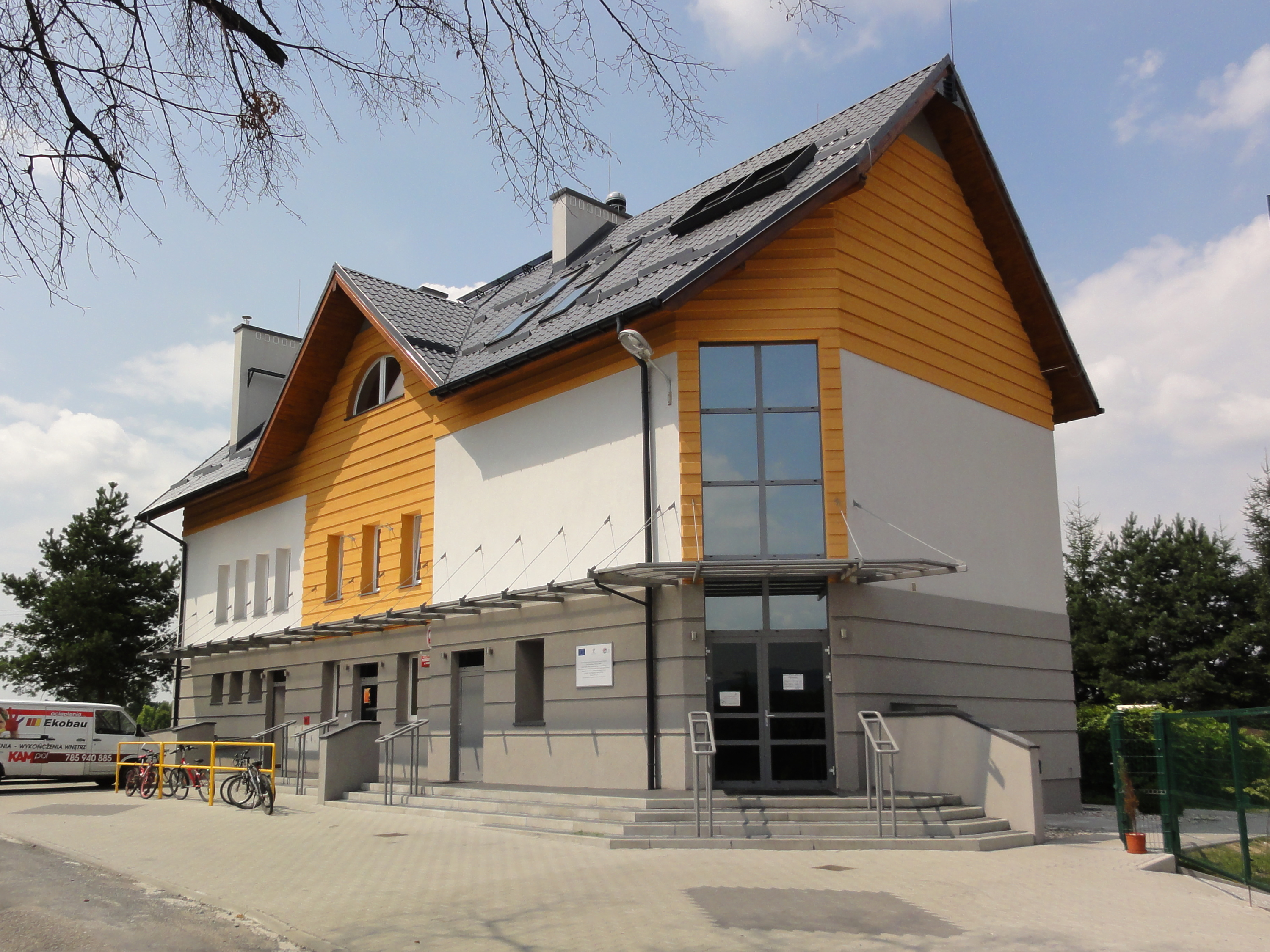 Dom Rolnika i Przedszkole Publiczne w Harbutowicach